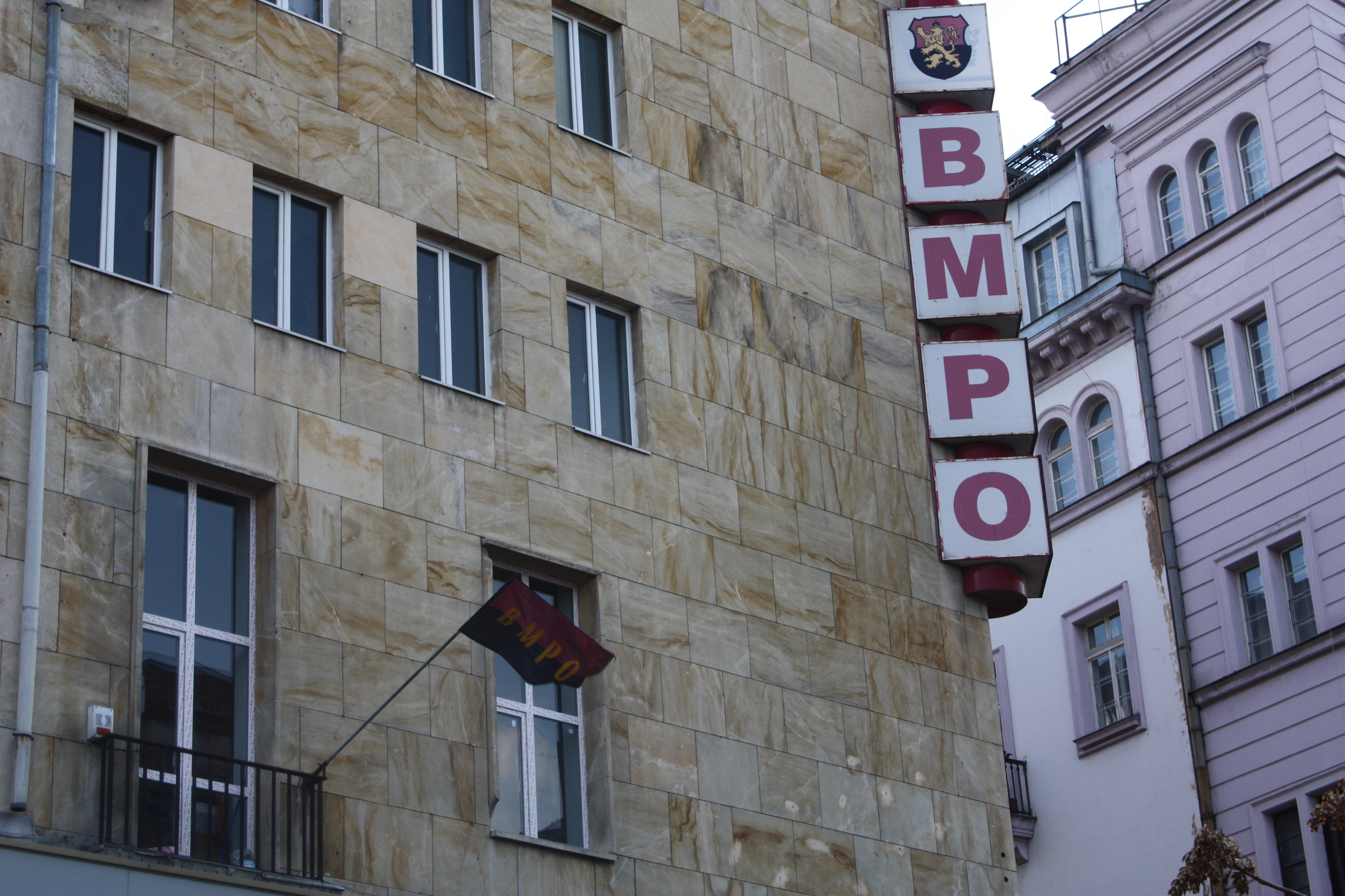 БМРО Съюз на македонските дружества Makedonja VMRO, Gebäude in der ul. Pirotska Sofia, Bulgaria